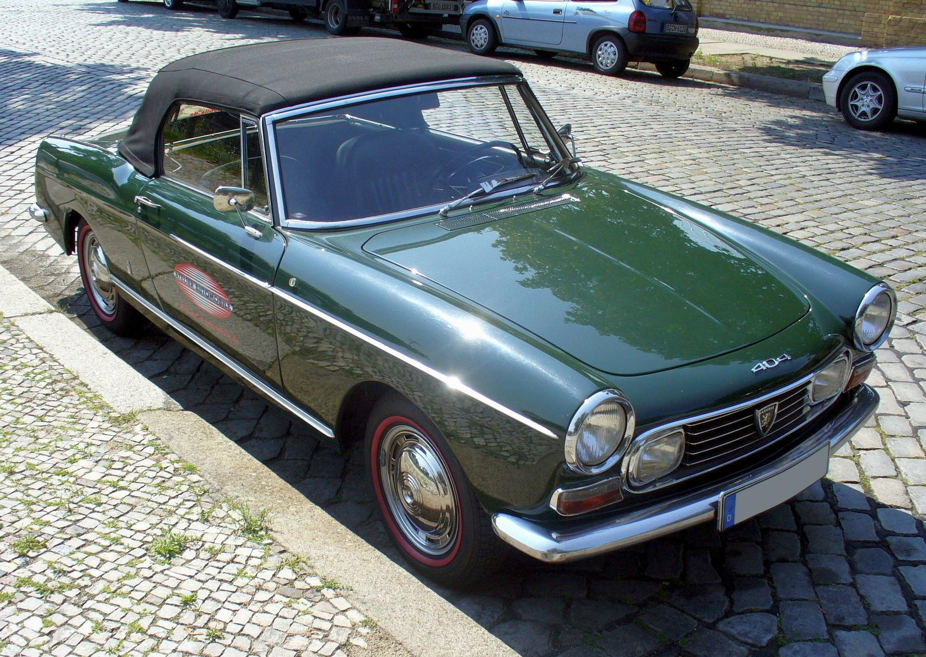 Peugeot 404 Cabrio